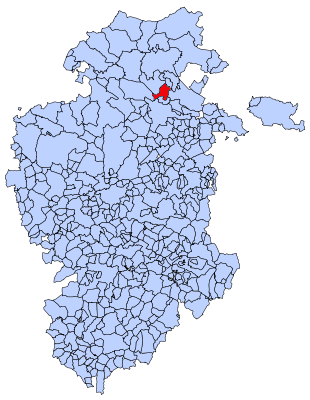 Situación de Trespaderne en el mapa de Burgos.